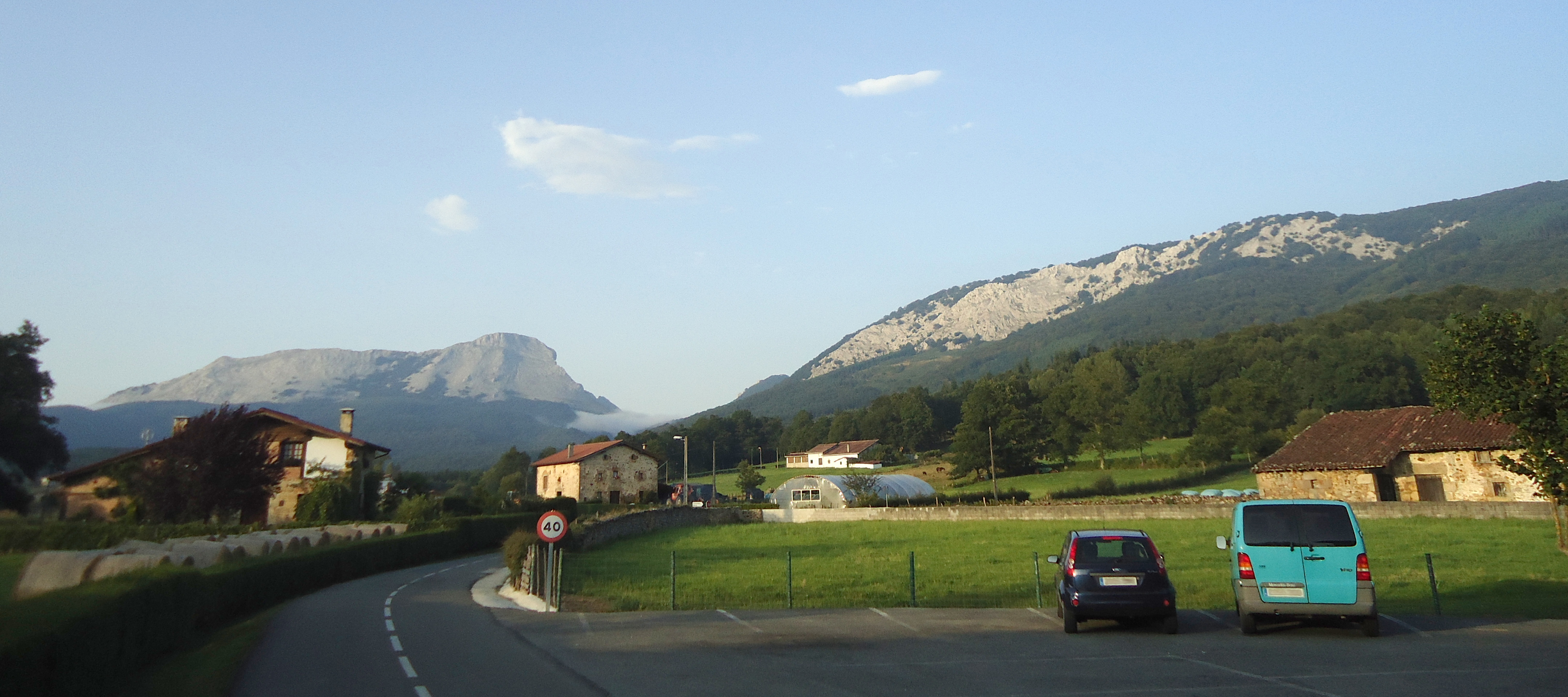 Oleta auzoa (Aramaio, Araba), Anboto mendia eta Arangio mendilerroa